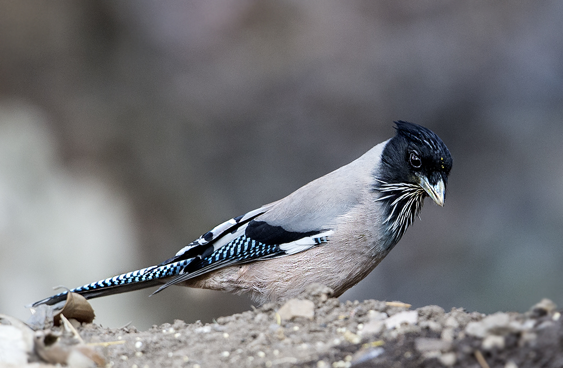 Sattal, April 2016